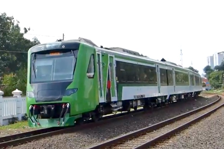 Uji coba KRD Bandara Minangkabau di Cirebon